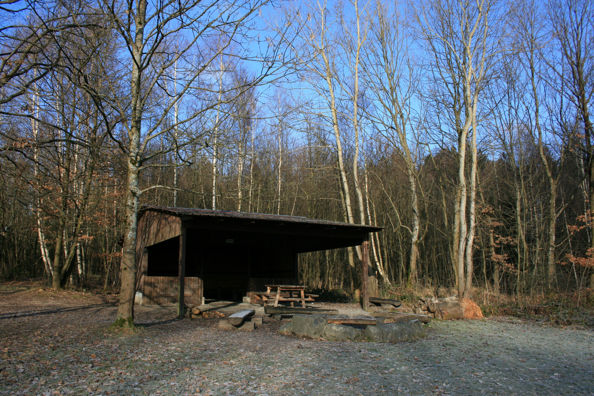 Große Schutzhütte Hueppelroettchen, Eitorf